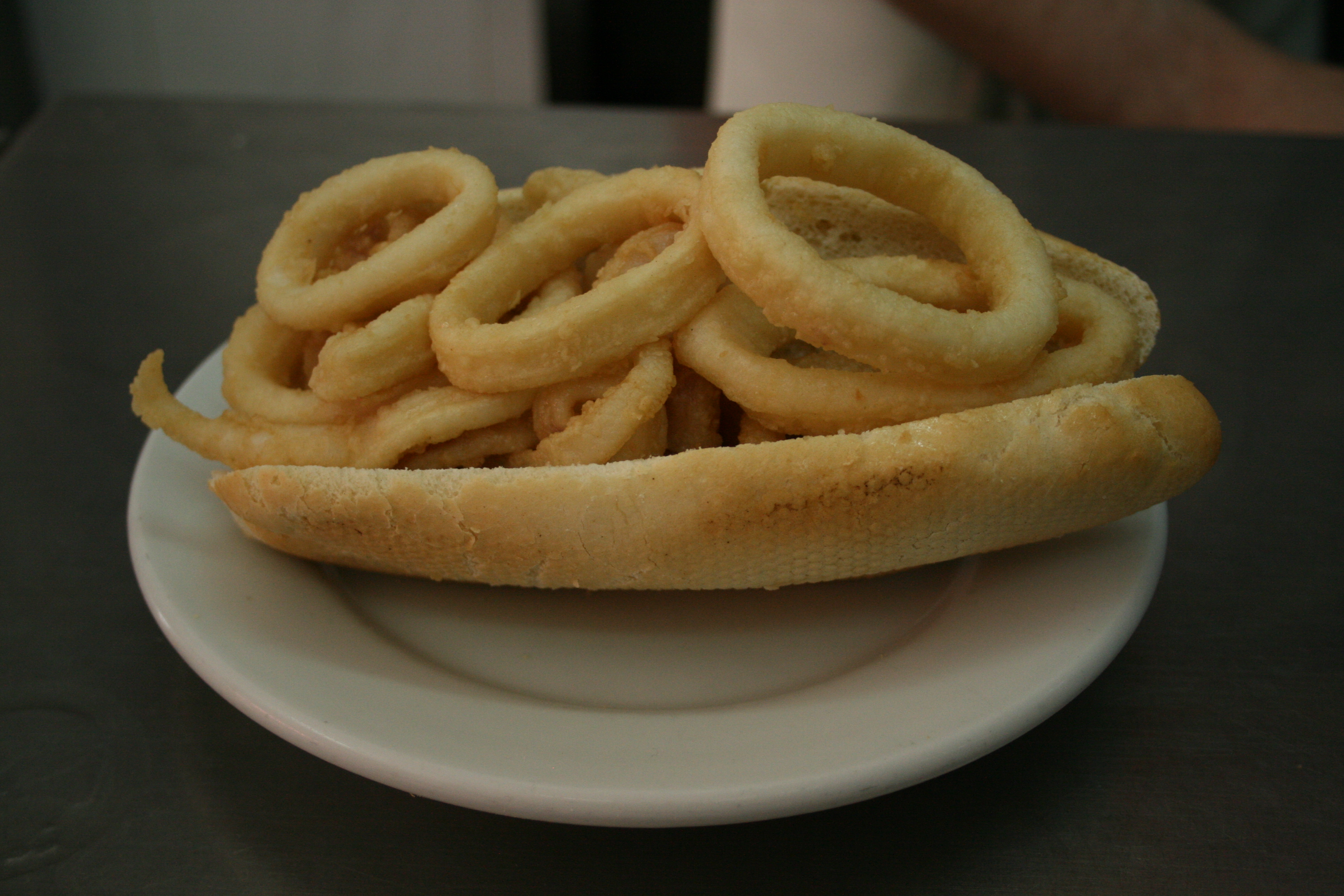 Bocadillo de Calamares clásico